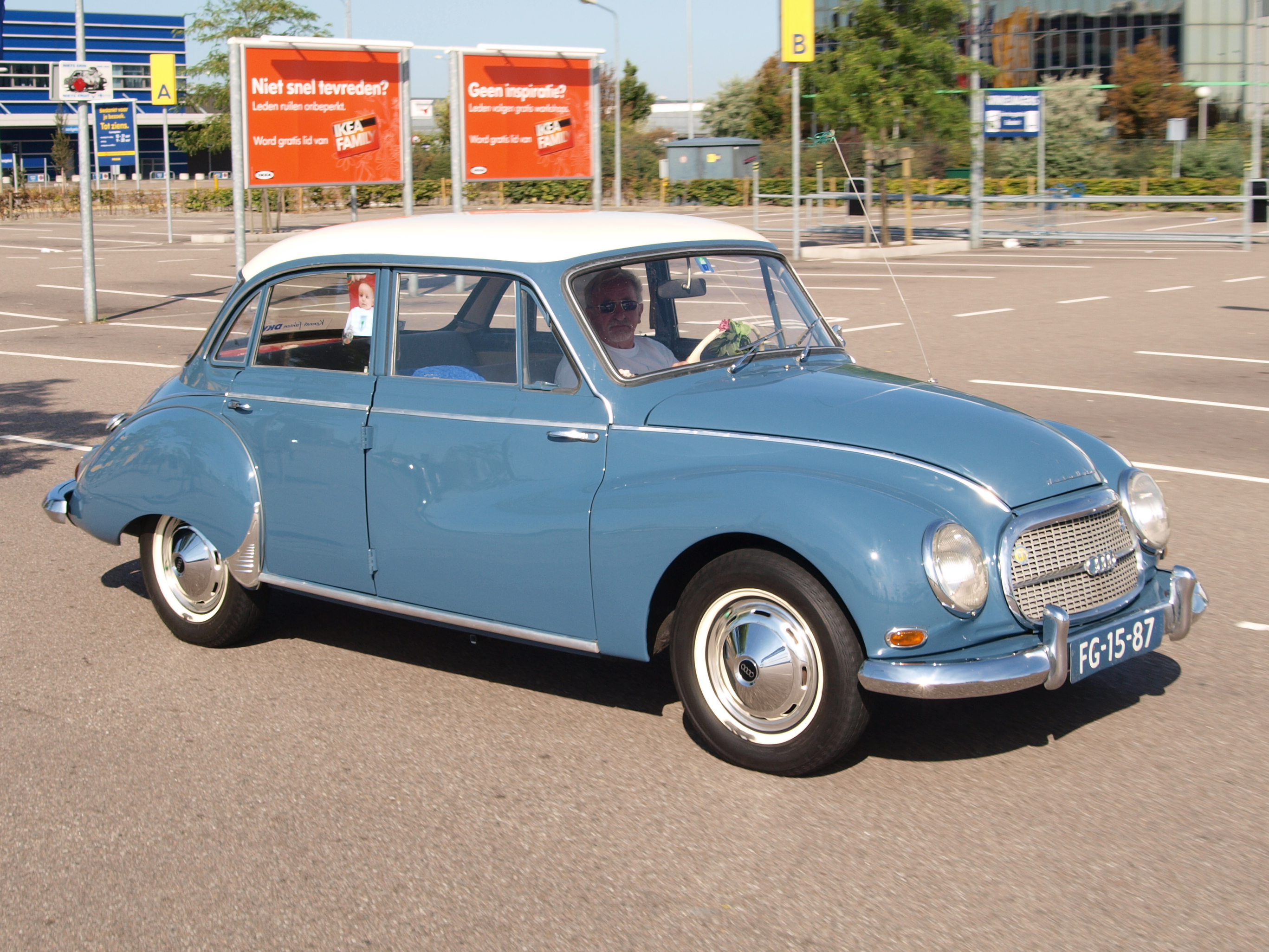 Auto Union 1000 Super